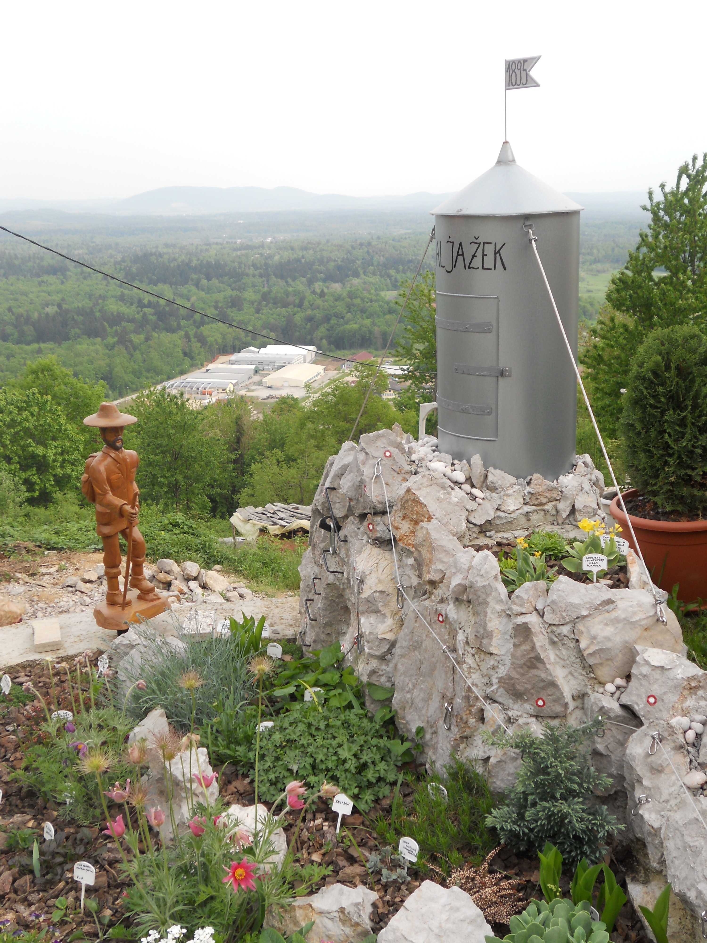 Nachbildung der Aljaž-Schutzhütte (Triglav)